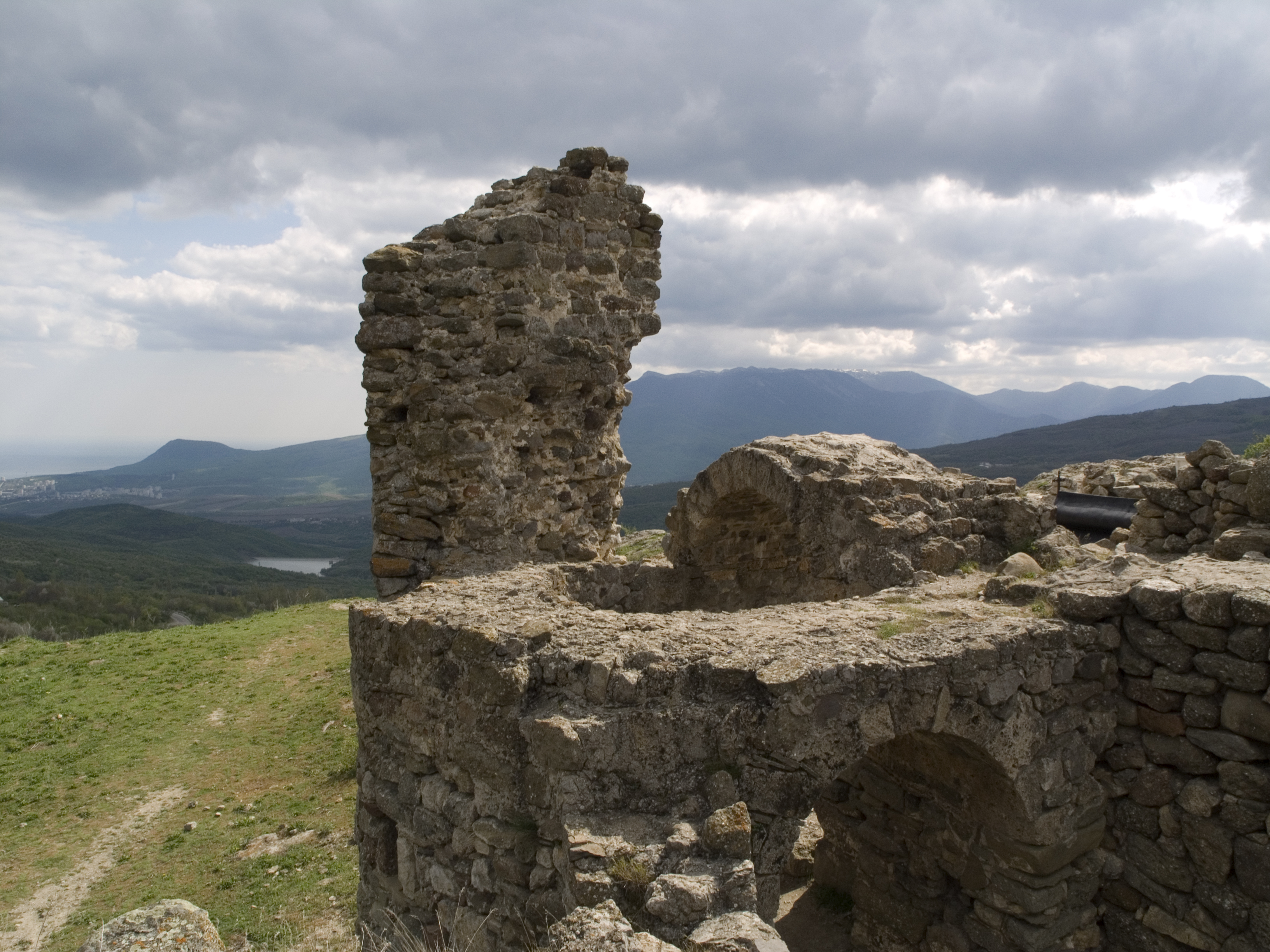 Крим, Демерджи - Археологічний комплекс «Сторожеве укріплення Фуна»